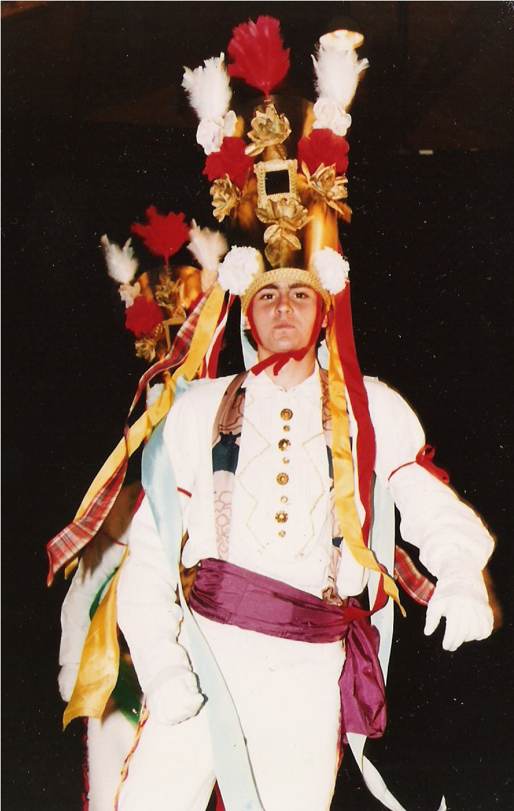 Imagen de un dantzari